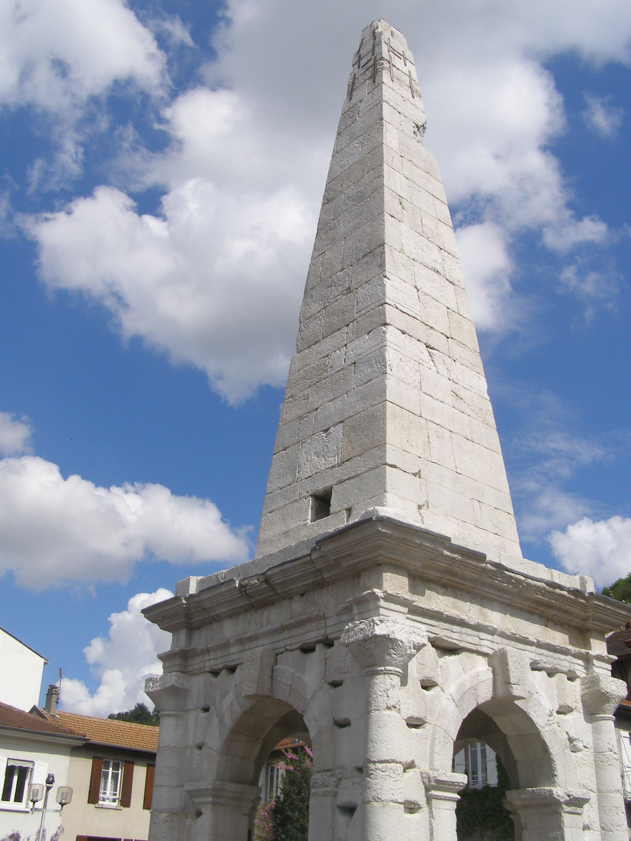 La pyramide (conctruction gallo-romain)